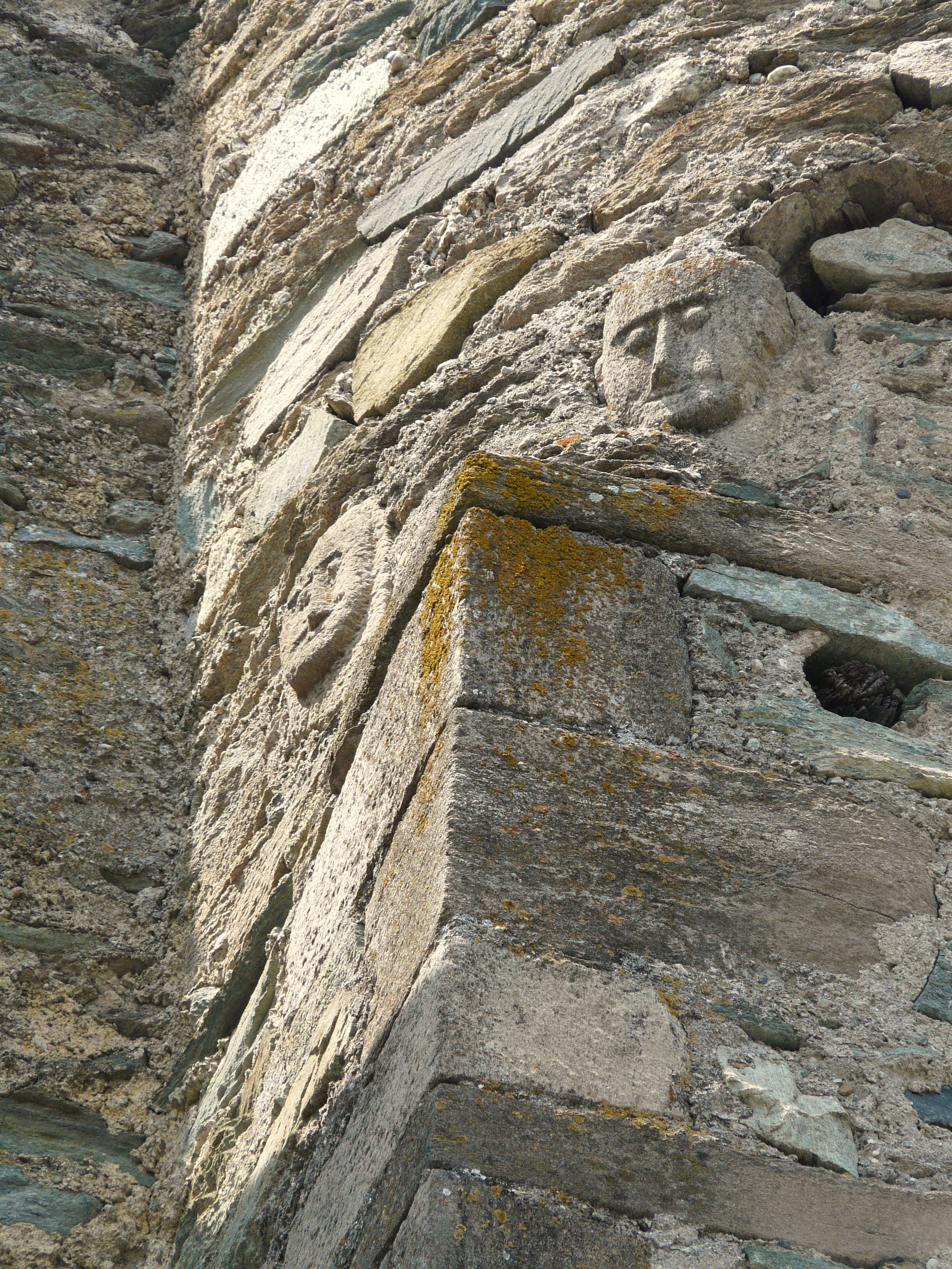 Serie di immagini del Castello di Fénis, Valle d'Aosta, Italia